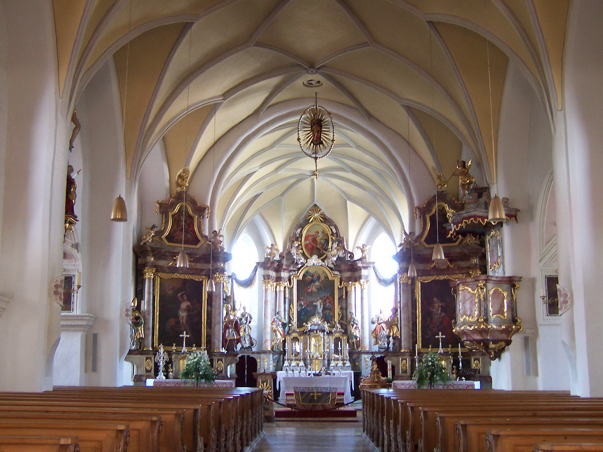 Essenbach, Rathausplatz 13. Katholische Kirche Mariä Himmelfahrt. Saalbau mit später angefügten Seitenschiffen, heute Staffelhalle, spätgotischer Bau um 1470, durch Seitenschiffe um 1670 und nochmals 1713 erweitert, im Kern romanischer Turm, spätgotisch erhöht, zunächst freistehend, 1713 in das südliche Seitenschiff integriert, Chor gegliedert durch Dreieckslisenen und Dachfries, mit Putzgliederung. Hauptschiff mit Netzgewölbe und drei Altären.